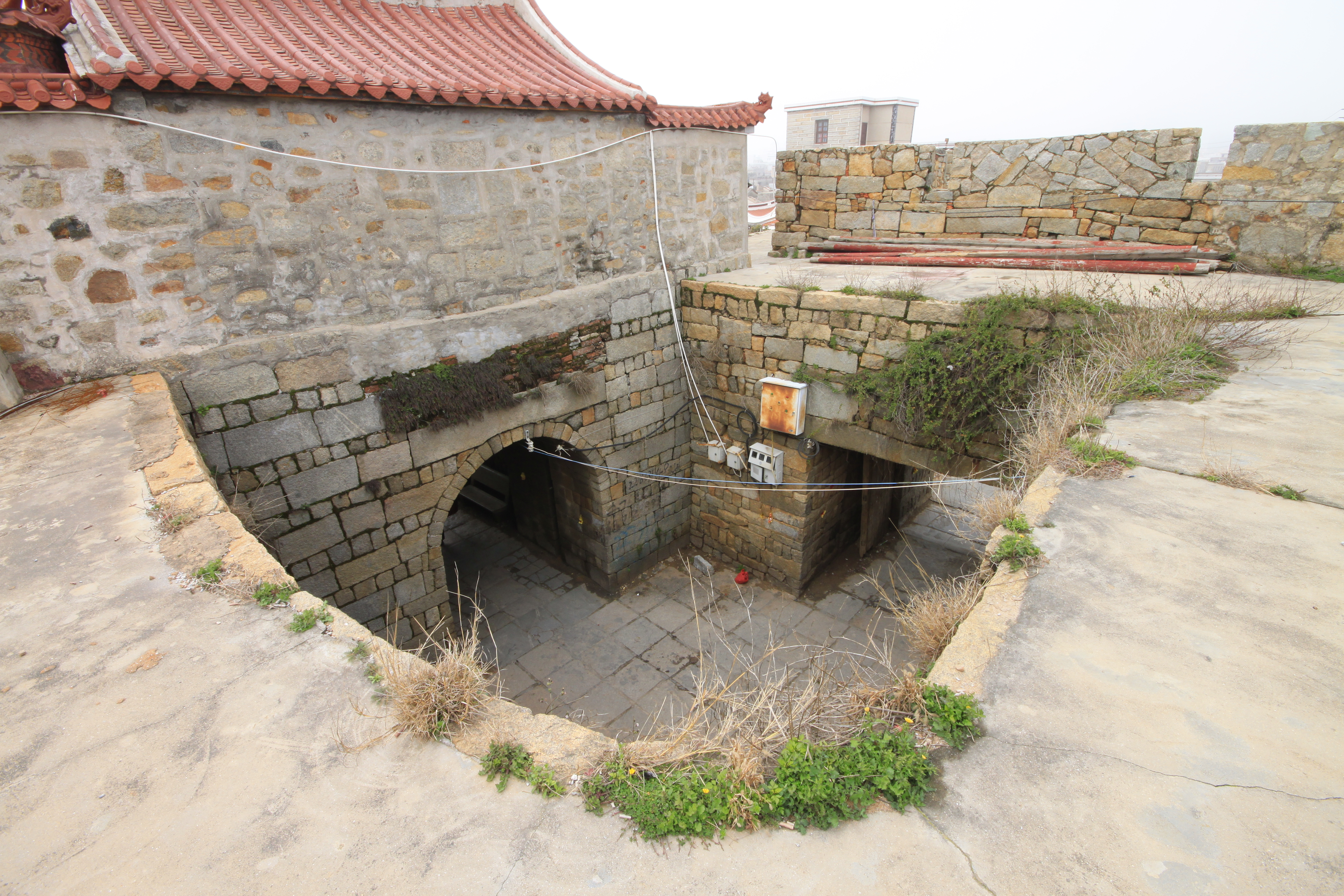 崇武城北部瓮城，位于中国福建省惠安县，是全国重点文物保护单位。